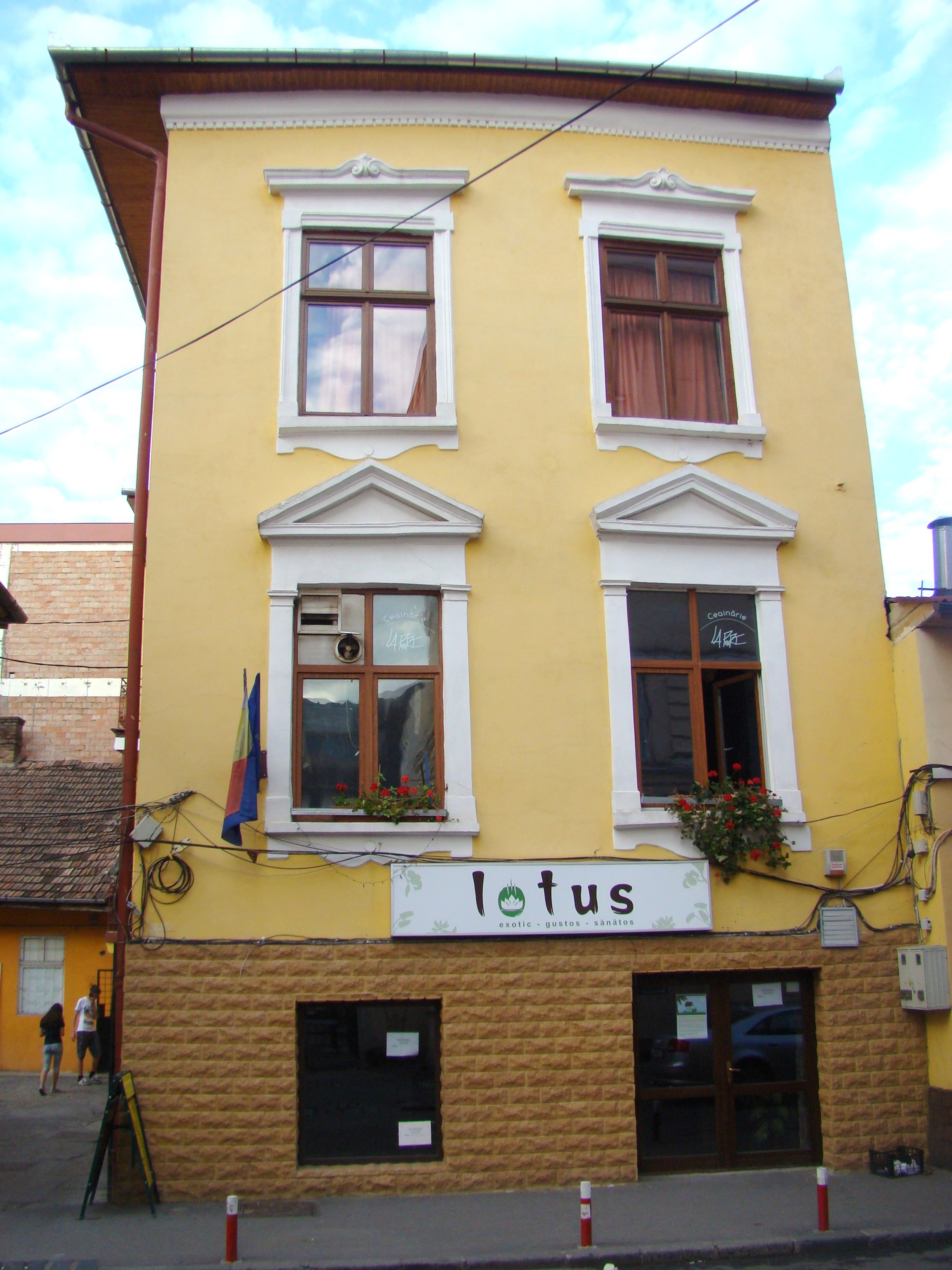 Clădire monument istoric, str. Tomis, nr.1 (în prezent Hermann Oberth)